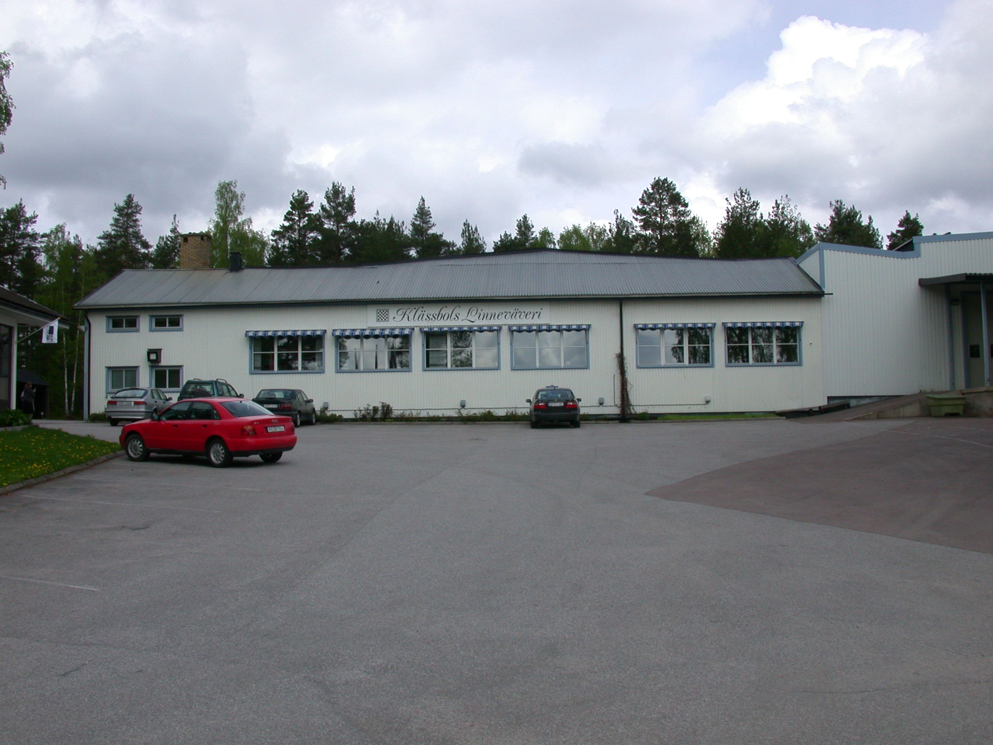 Klässbol textile mill, Klässbol, Sweden. Photo by Riggwelter, May 20, 2006.